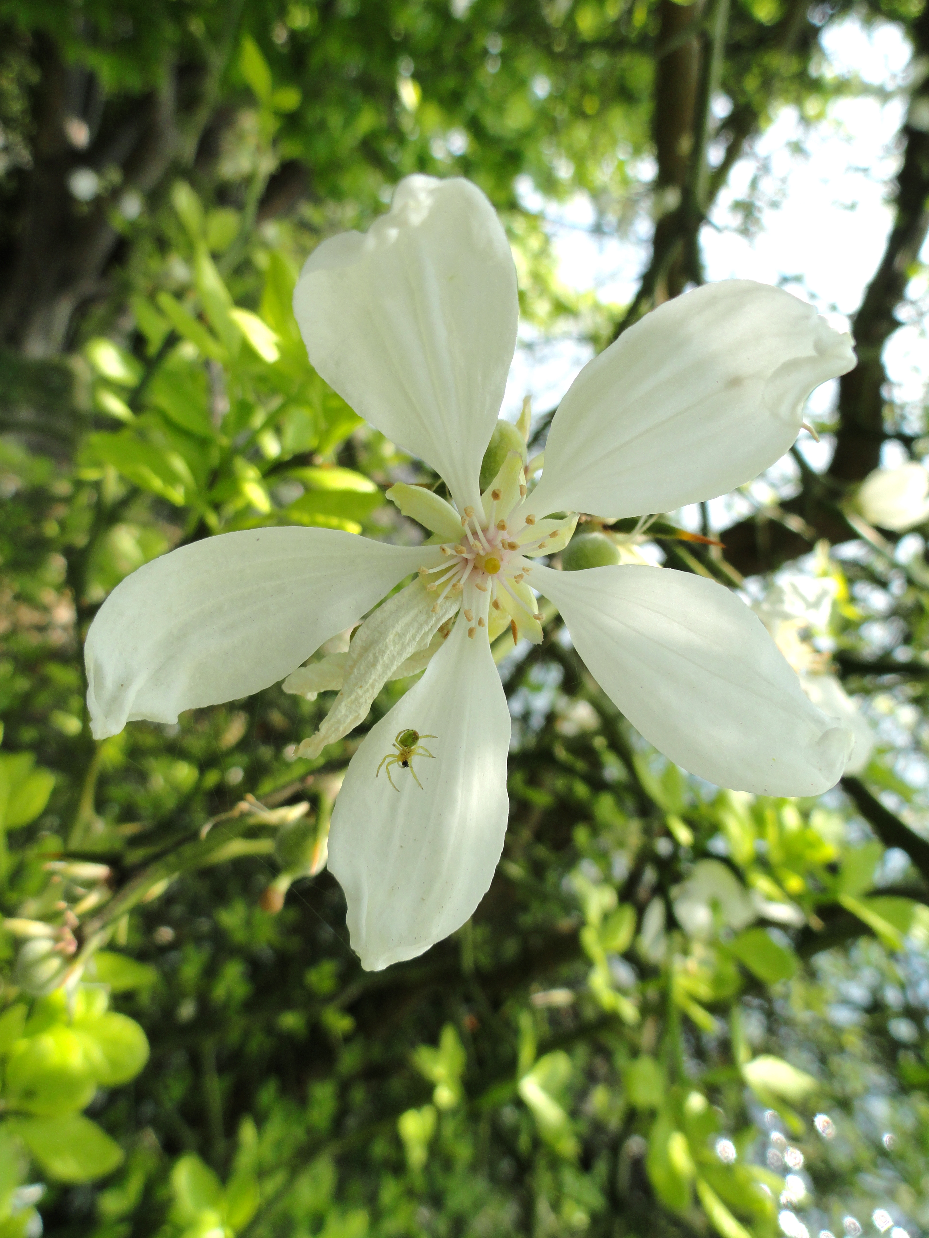 Poncirus trifoliata. Botanical specimen on Isola Madre (Stresa), Lake Maggiore, Italy.